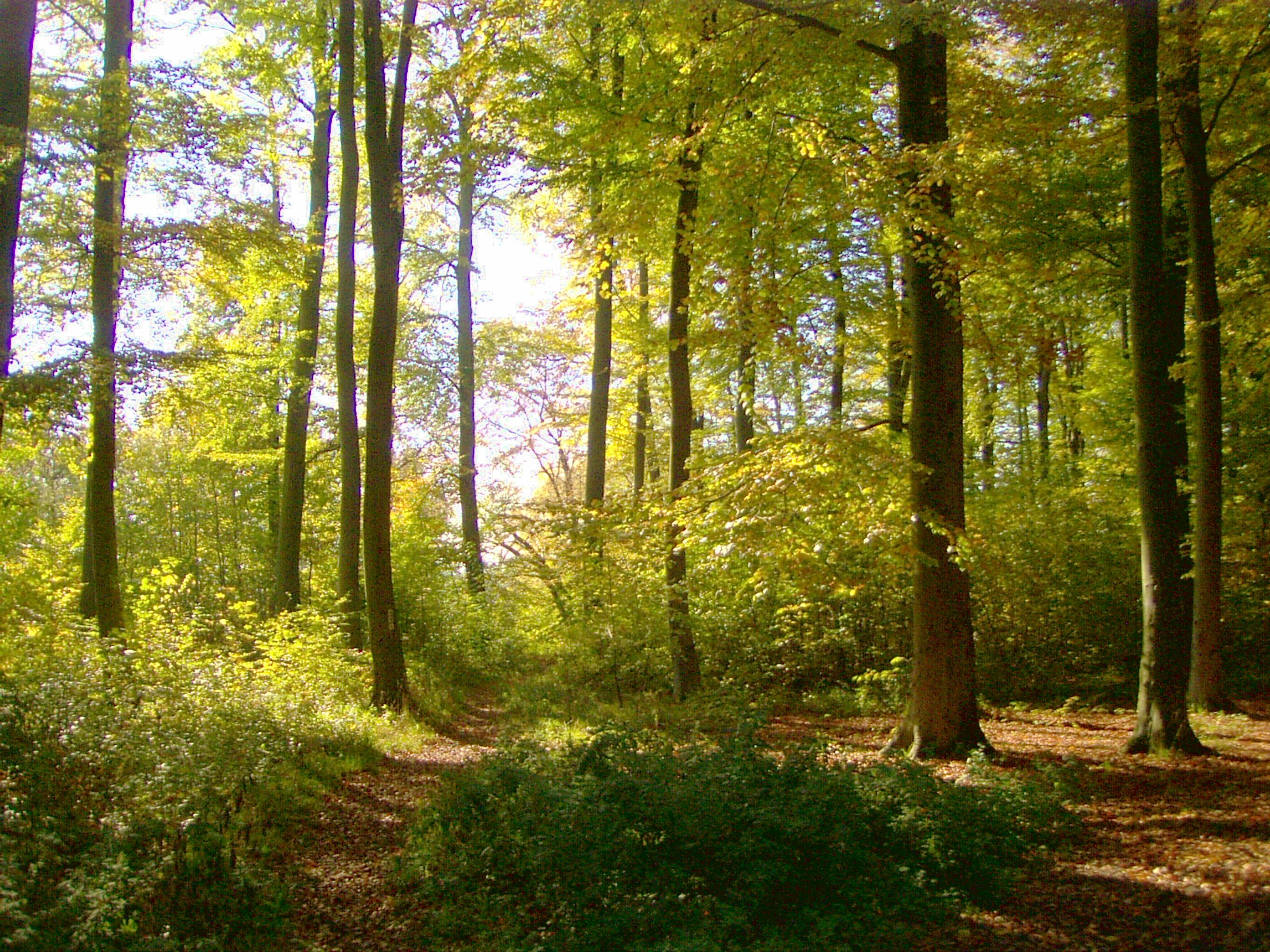 Strukturreicher und naturnaher Buchenwald am Schullandheim Waldschlößchen (Mühlhäuser Stadtwald).